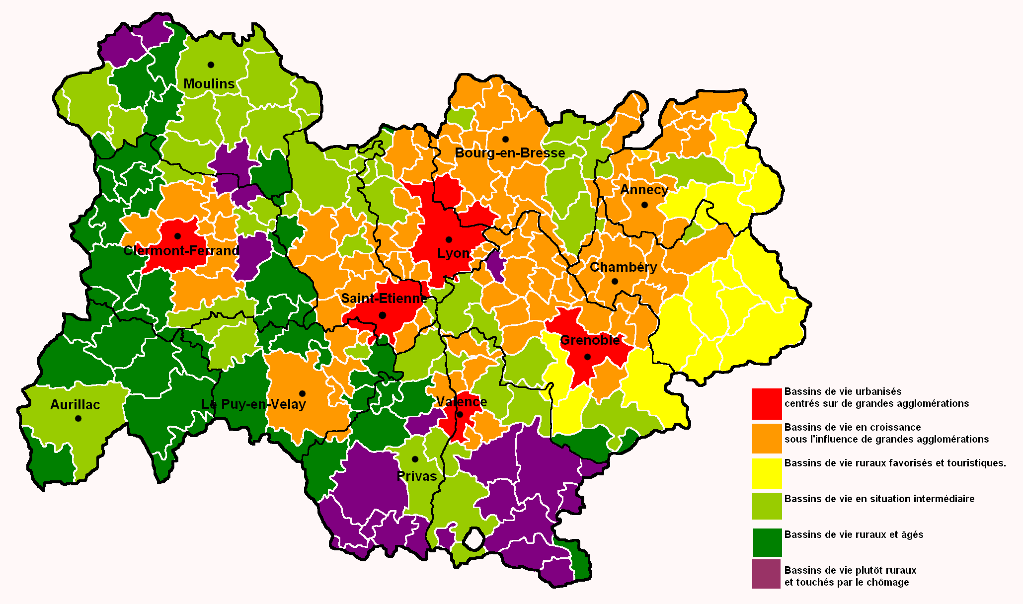 Typologie des bassins de vie dans la région Auvergne-Rhône-Alpes. Source INSEE recensement 2011, CAF, DGFIP.